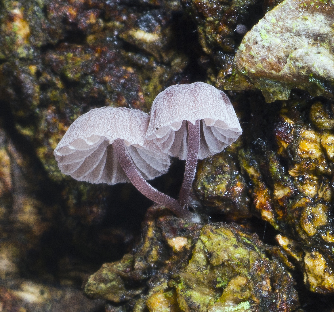 Sopparten borkhette (Mycena meliigena).